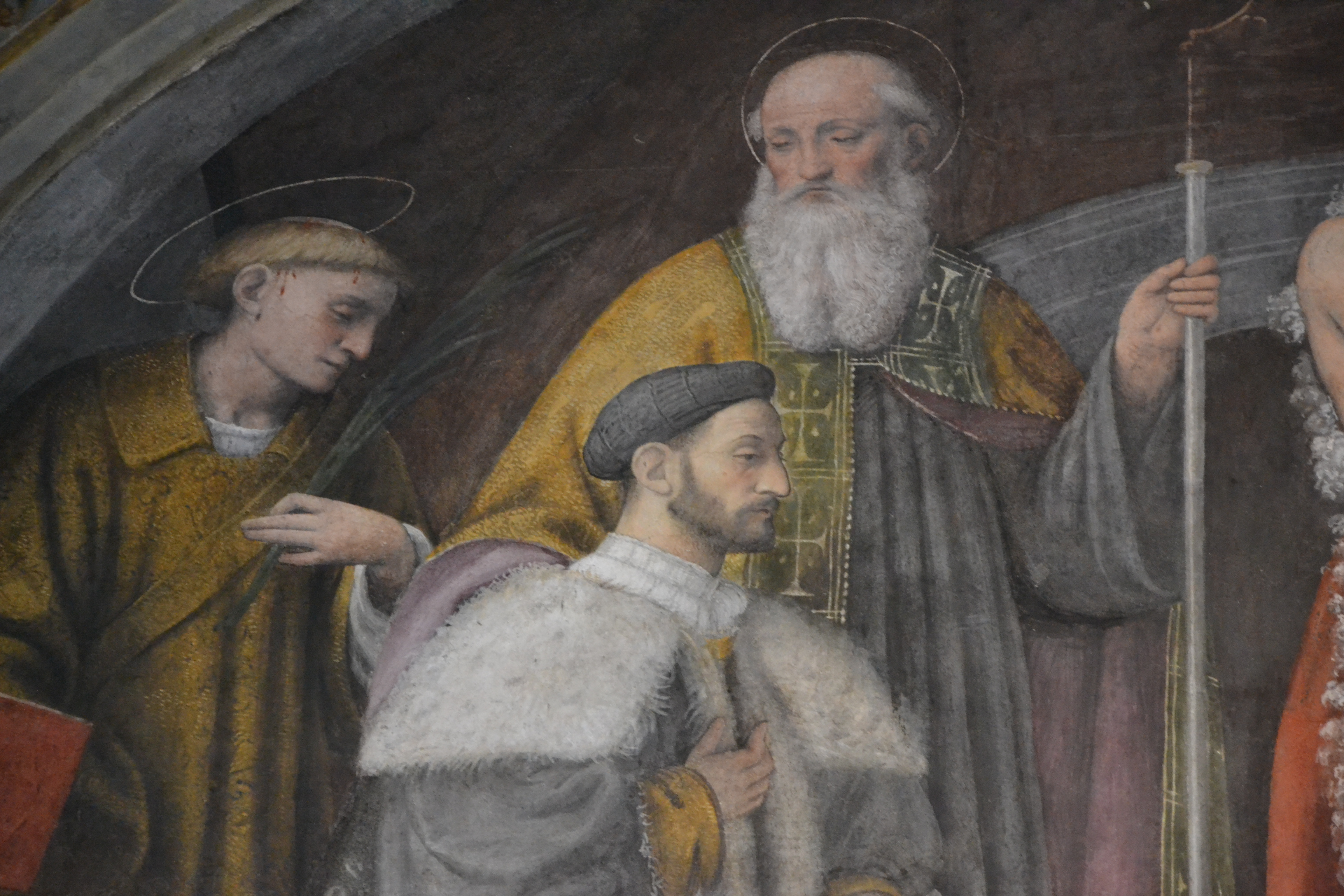 Presunto ritratto di Alessandro Bentivoglio (Bologna, 1474 – Milano, 1532), Committente degli affreschi (nel 1519-1520), fra Santo Stefano, San Benedetto da Norcia e San Giovanni Battista.Milano - San Maurizio al monastero maggiore, aula dei fedeli, Affreschi di Bernardino Luini, del XVI secolo